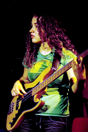 Bennetts Lane, November 2008